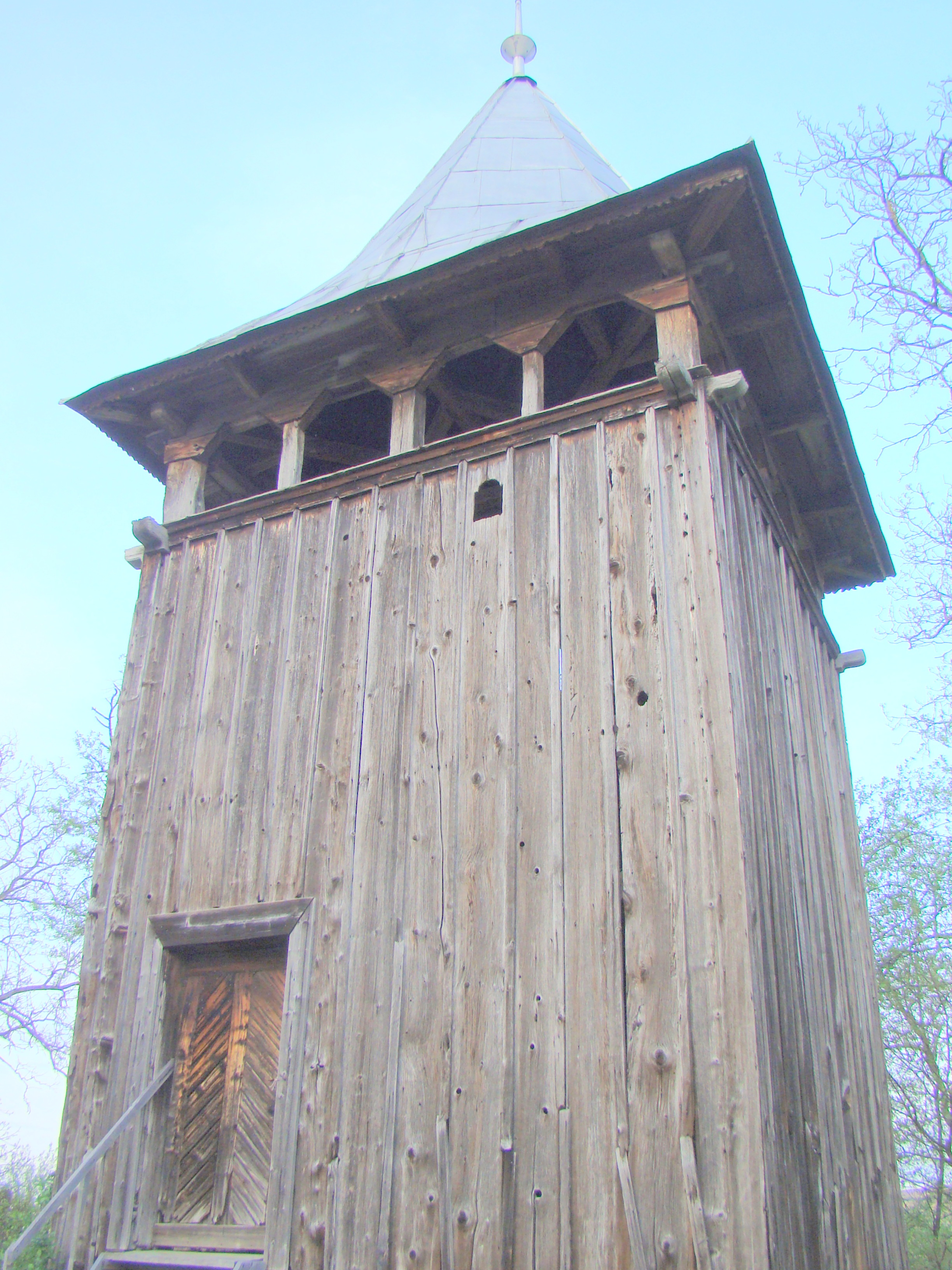 Clopotnița de lemn, sat Coșeiu; comuna Coșeiu 02